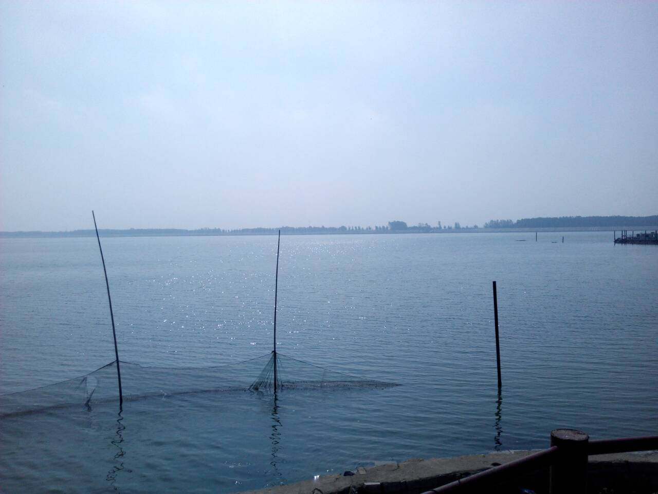 在大安山拍摄的东平湖